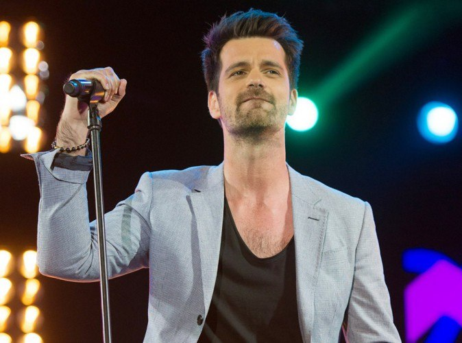 Corson на концерте